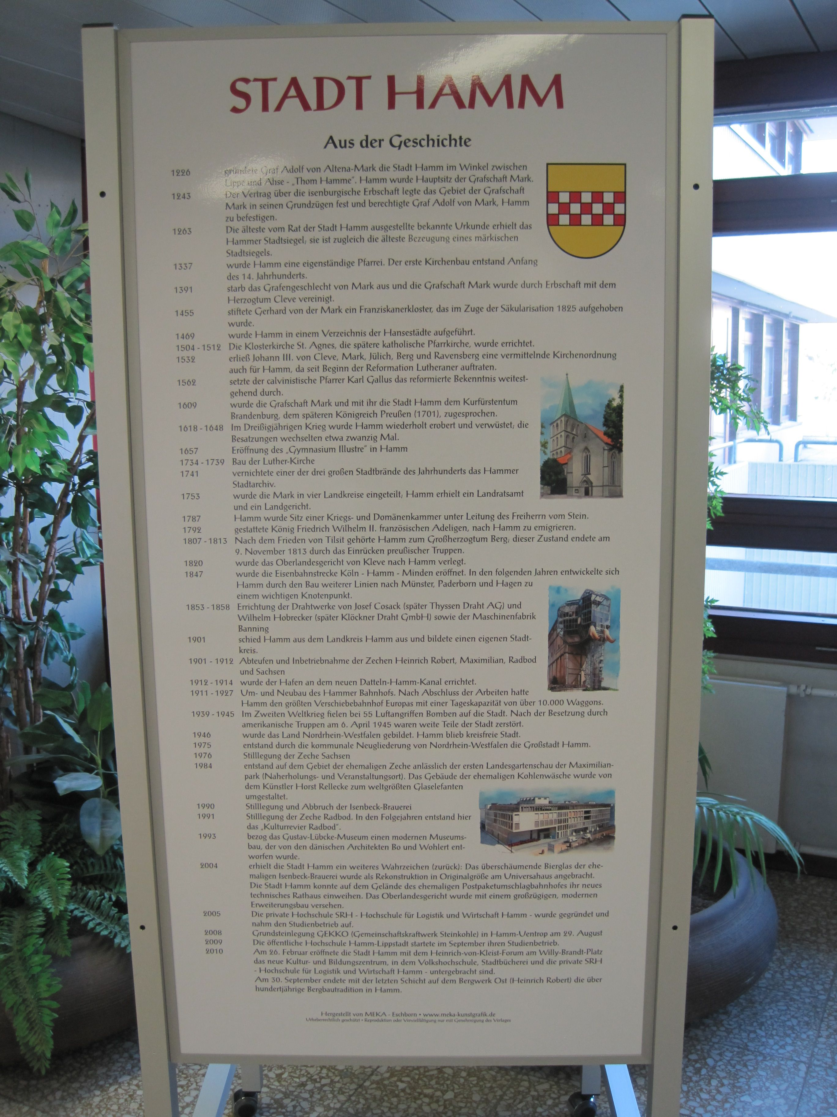 Das Foto zeigt eine Chronologie der Geschichte der Stadt Hamm; diese steht im Rathaus Bockum-Hövel.